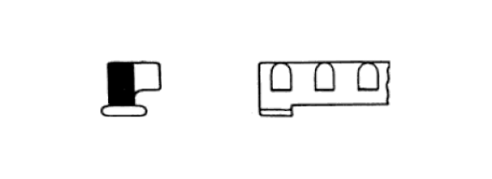 Zahnstange System , Schnittdarstellung und Aufriss